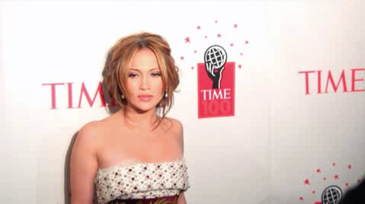 Time 100 2006 gala, Jennifer Lopez.